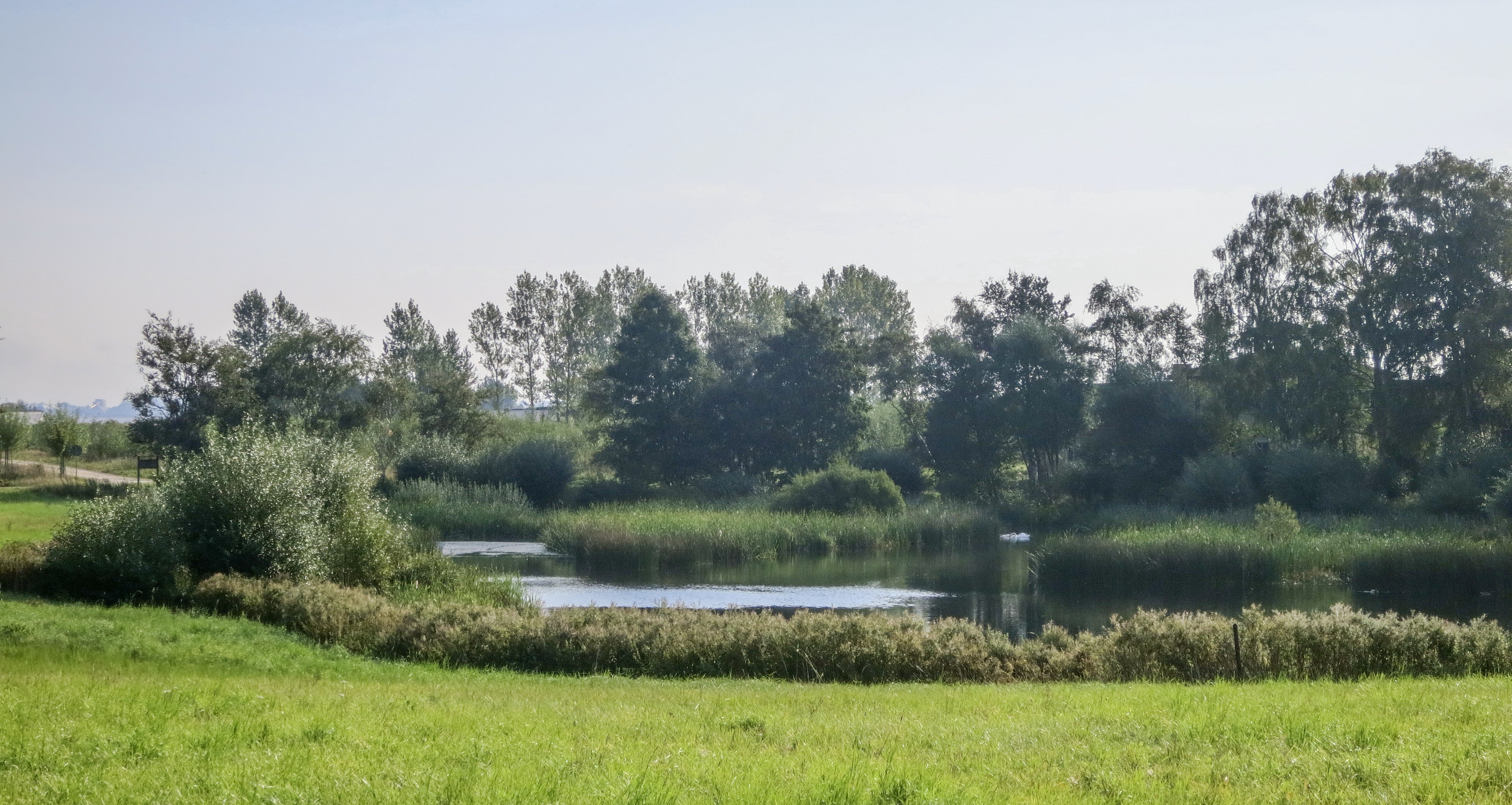 Vallbymosse i Kyrkheddinge mellan Staffanstorp och Dalby